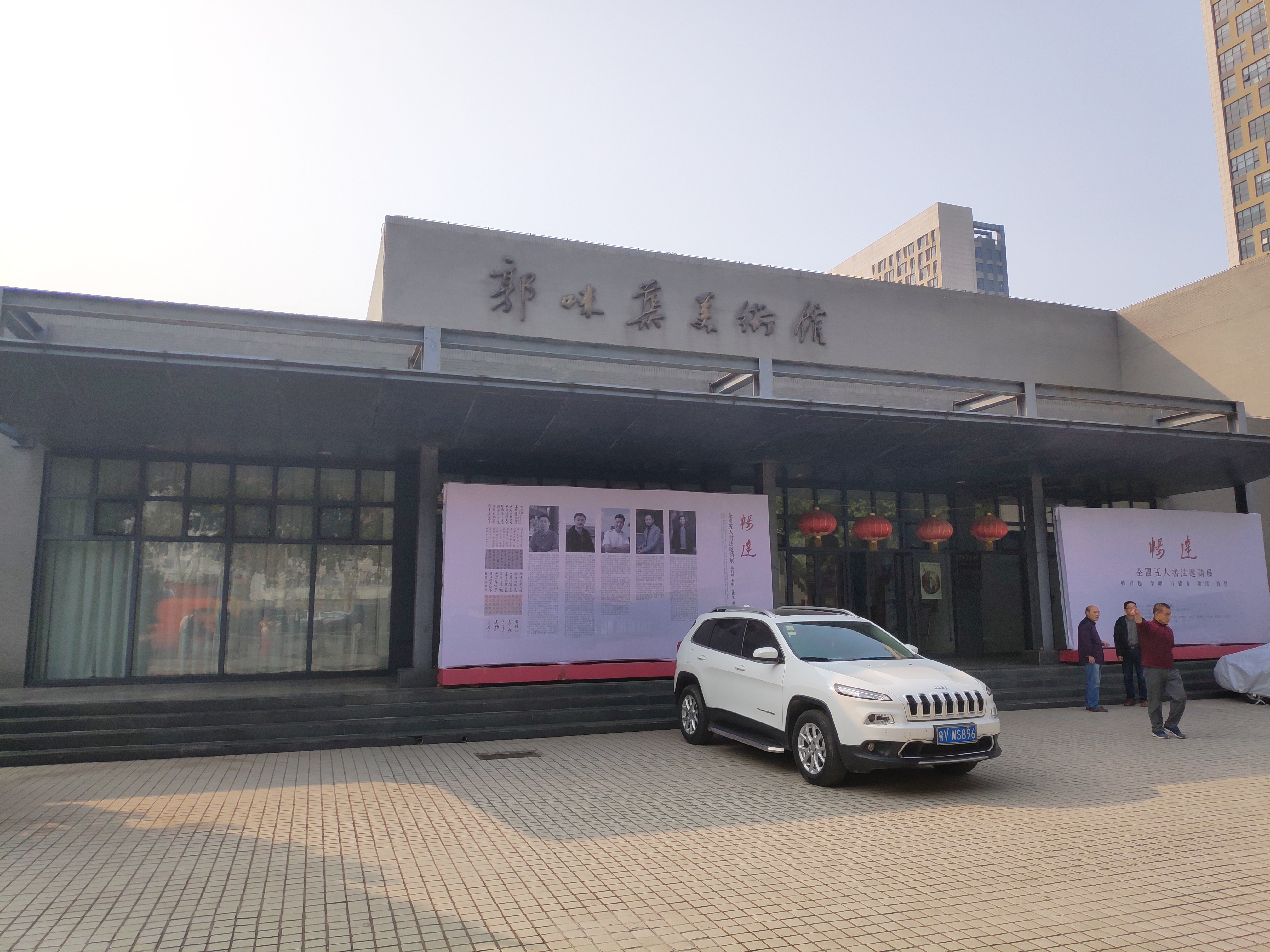 中文（中国大陆）: 郭味蕖美术馆，位于潍坊市潍城区